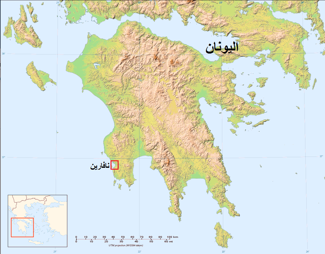 خريطة لنازا المجال الحر